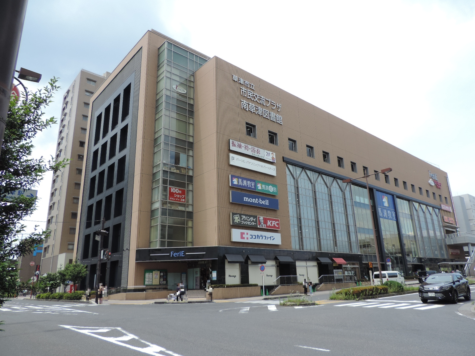 フェリエ南草津（滋賀県草津市）。2020年6月撮影。